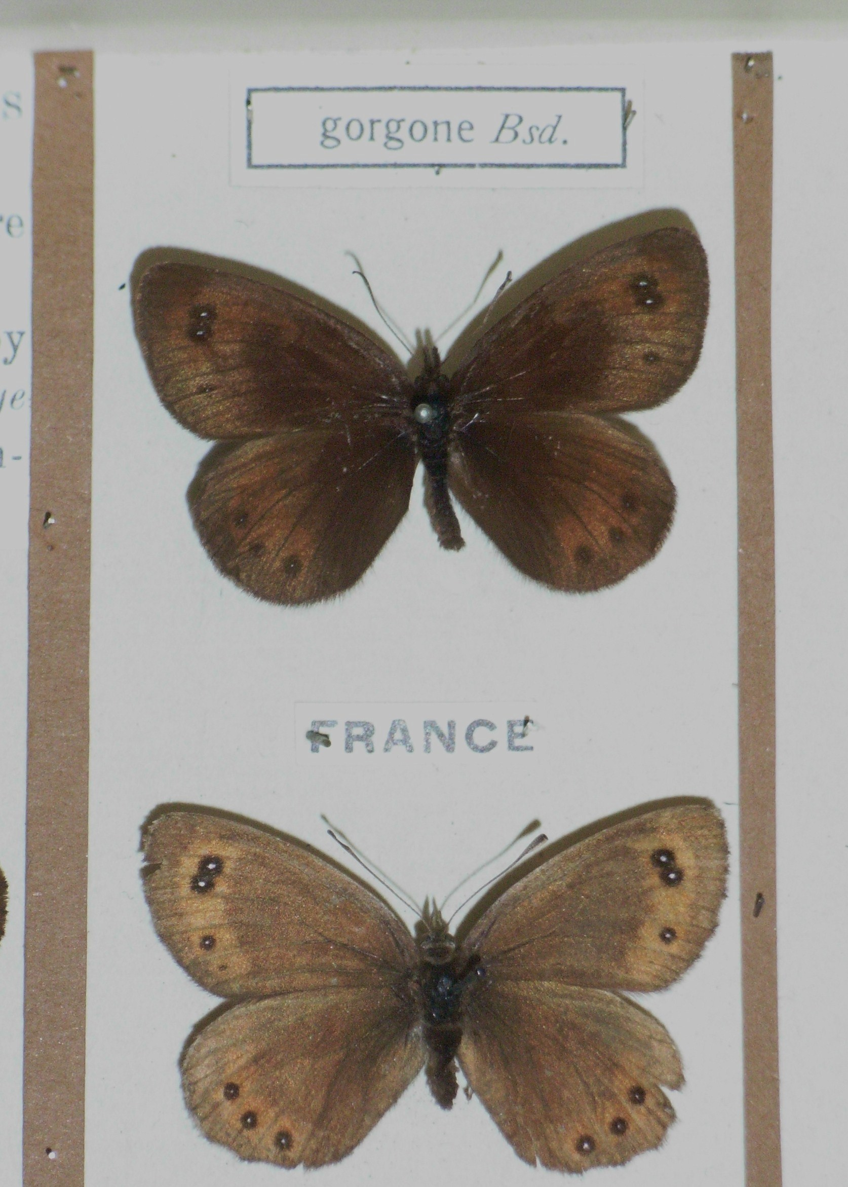 Erebia gorgone Boisduval, 1832